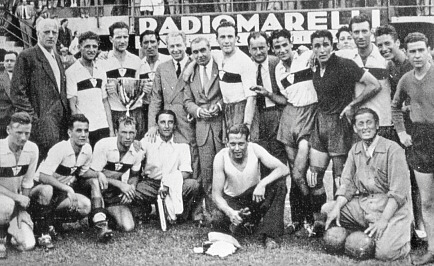 Firenze, stadio Comunale Giovanni Berta, 6 giugno 1937. Il Genova 1893 (Genoa) della stagione 1936-37 in posa dopo la vittoria della Coppa Italia.